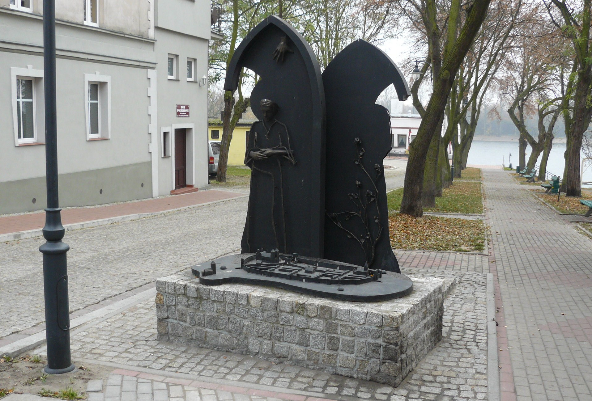 Chełmża, Łazienna Street.